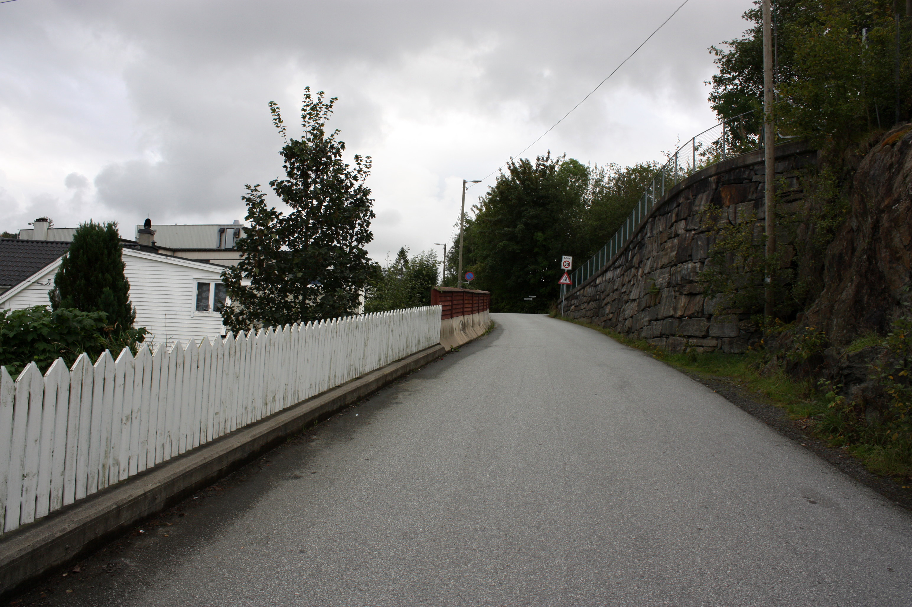 Lundhaugvegen, Fana, Bergen.